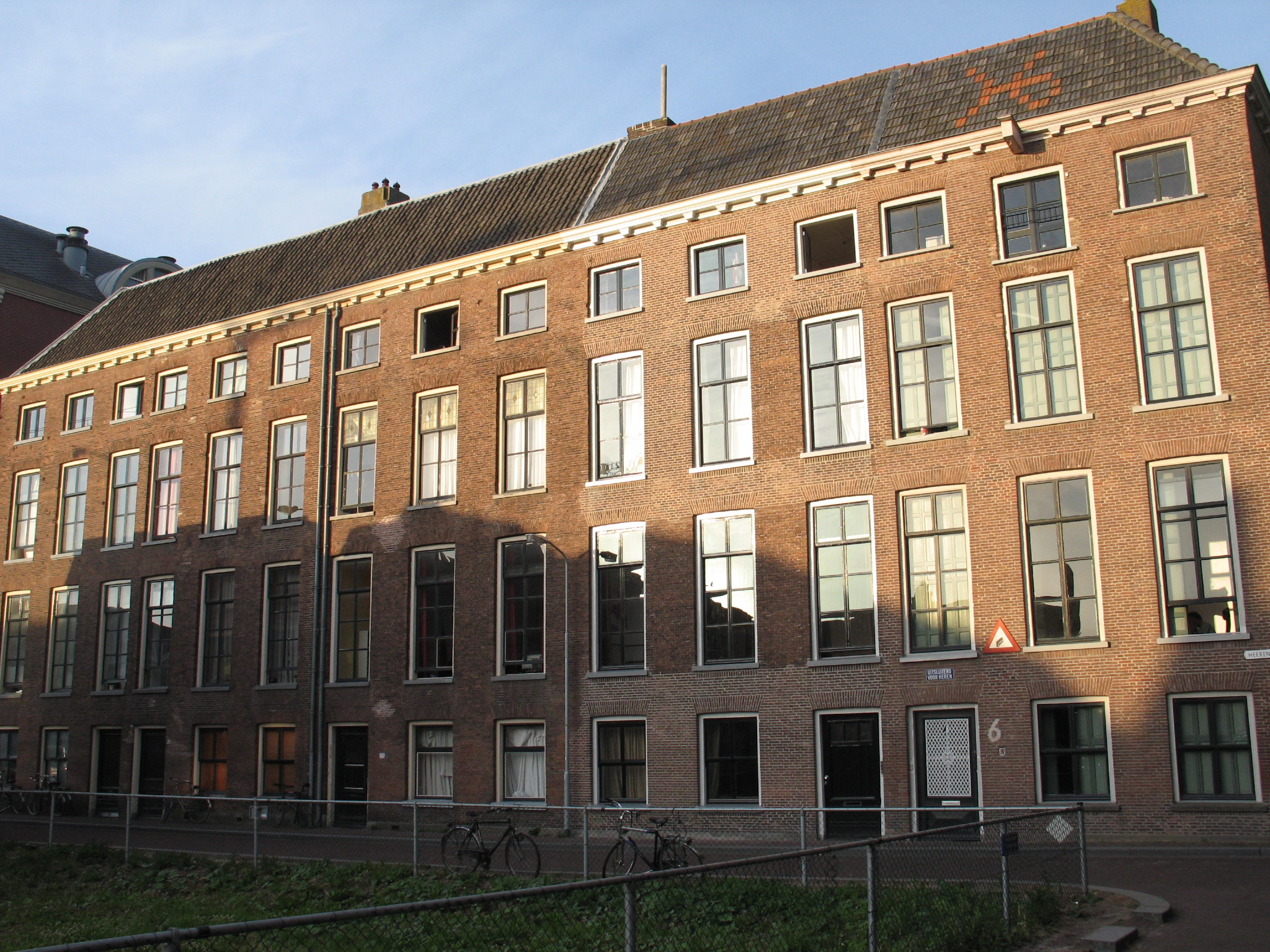 Rijksmonument in Wageningen Herenhuizen Heerenstraat 6,8,10,12 en 14 Torck